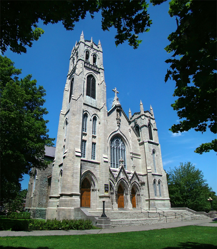 Église Saint-Viateur d'Outremont, Montréal, Québec, Canada.